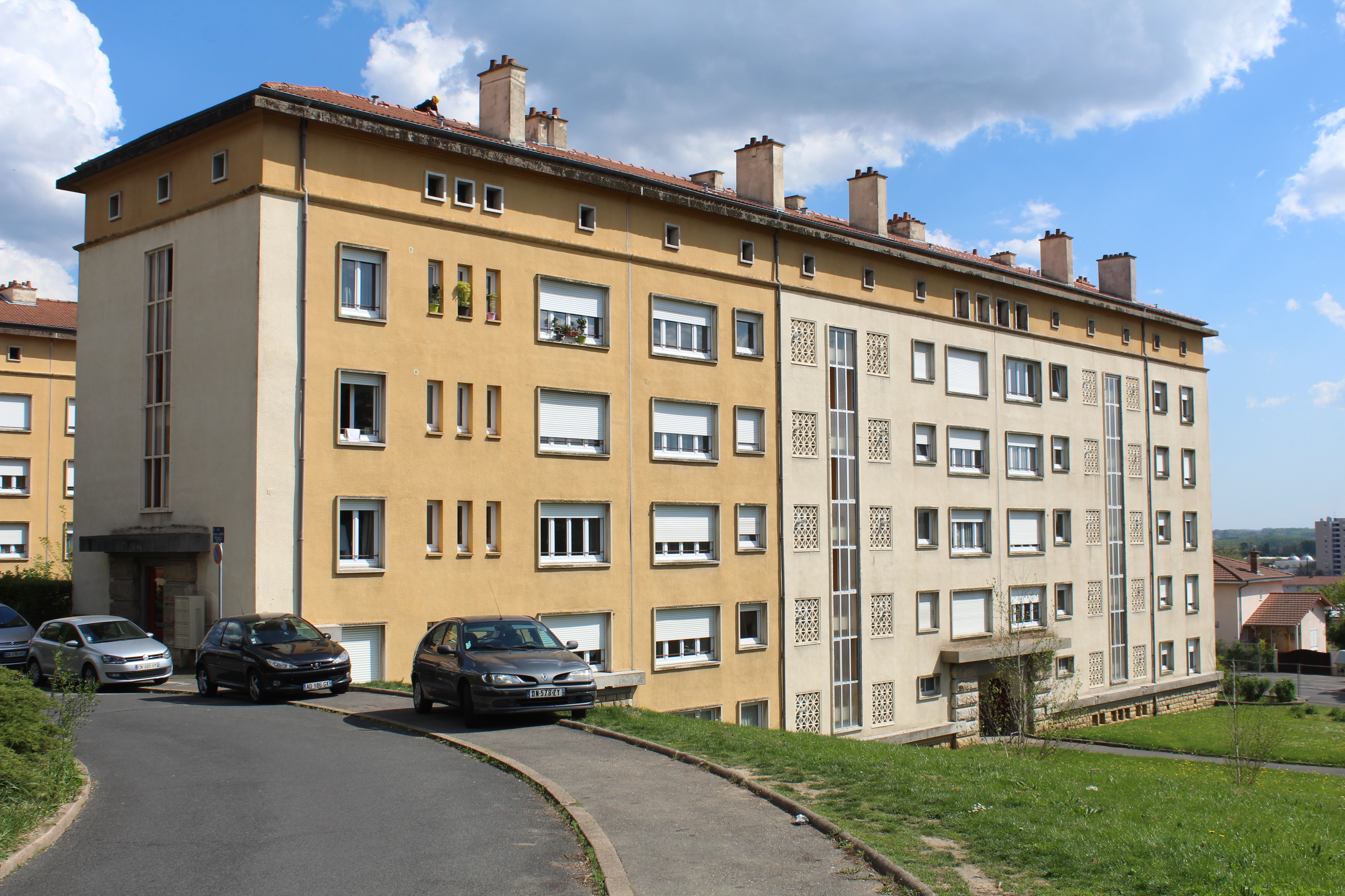 Immeubles, rue Alfred Lacroix, quartier de Bioux, Mâcon.